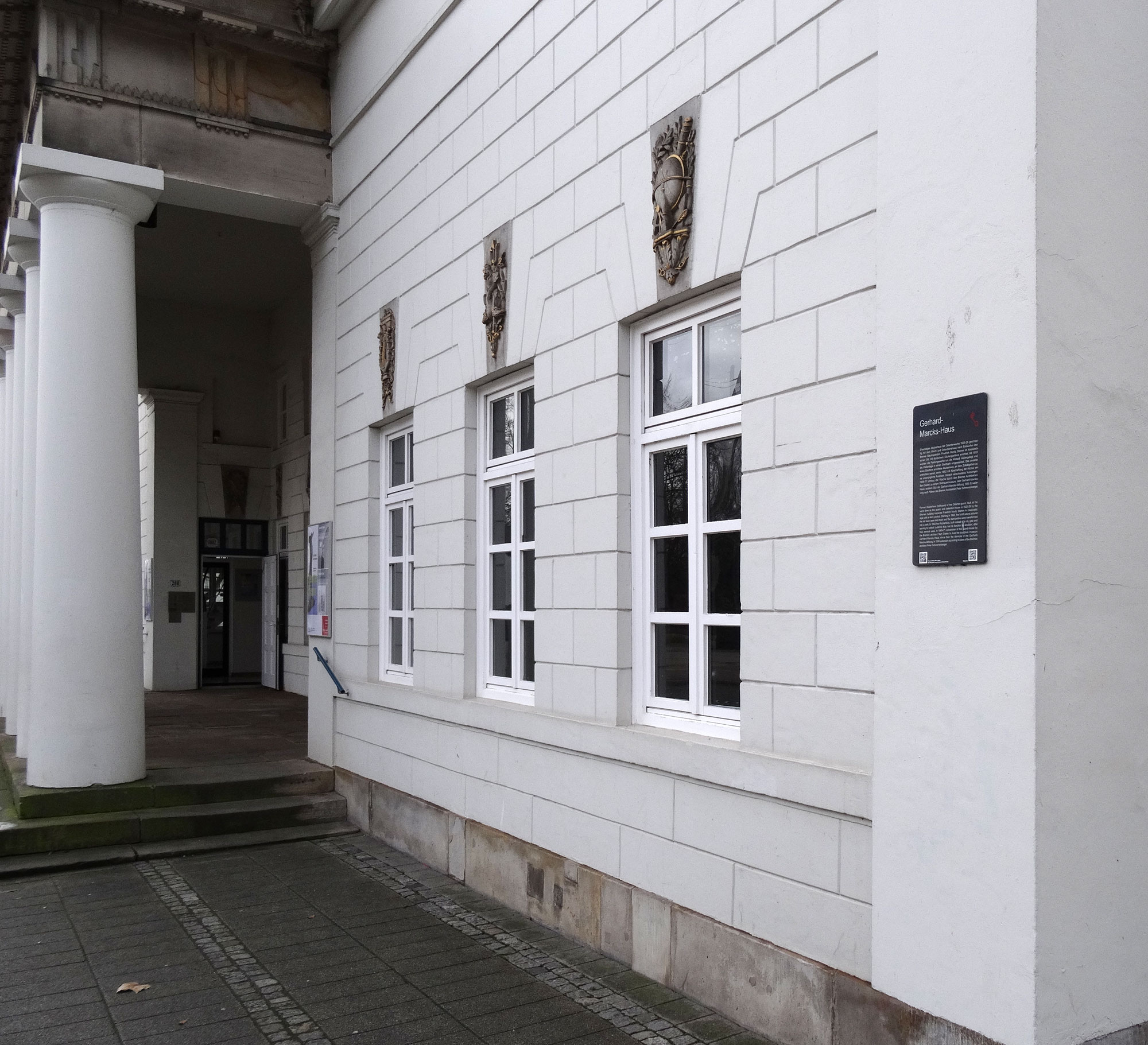 Infotafel mit QR- und QRpedia-Code: Gerhard-Marcks-Haus